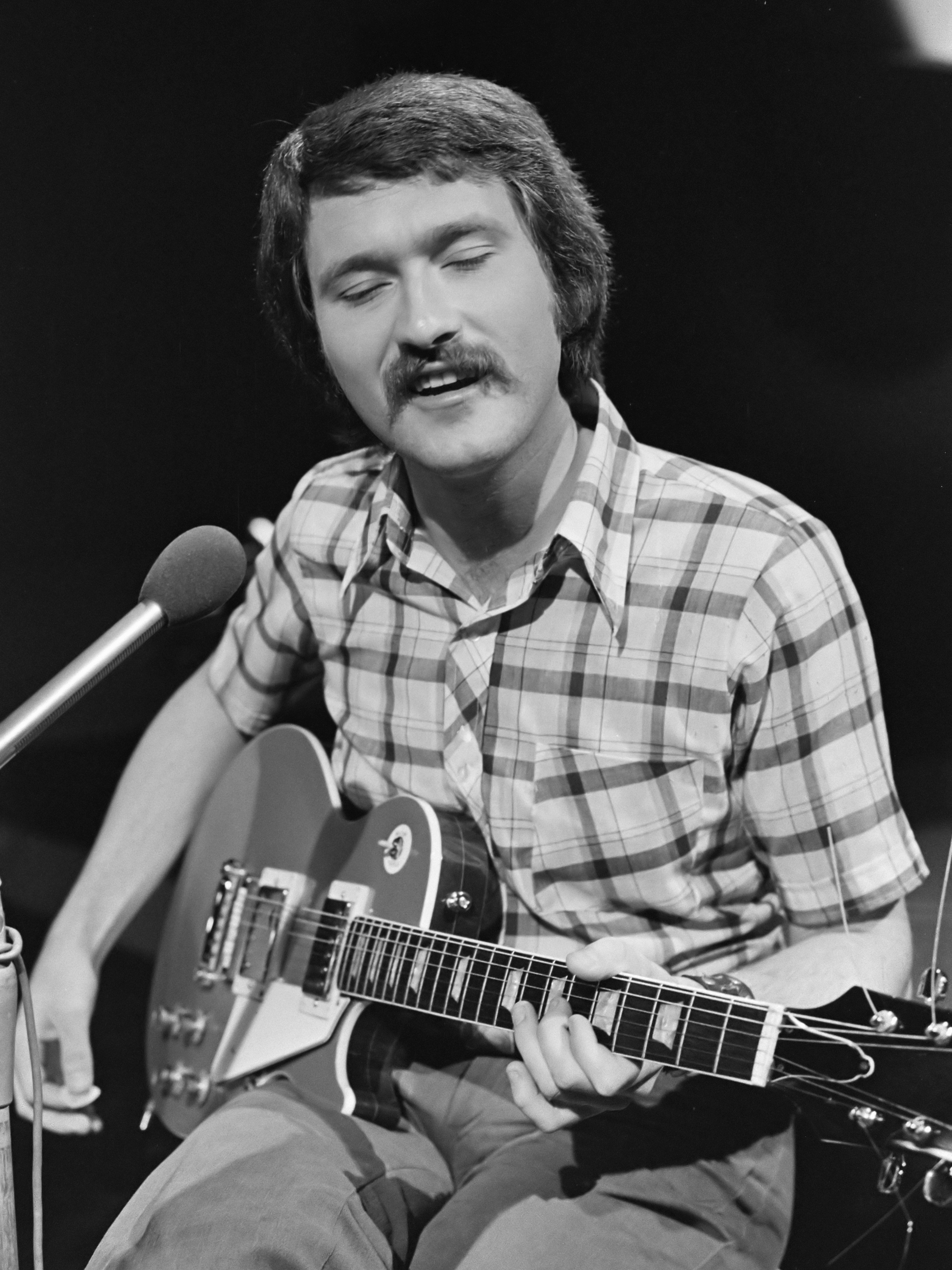 Pelle Carlsson (sic) in programma muziekmotief van EO 8 augustus 1974